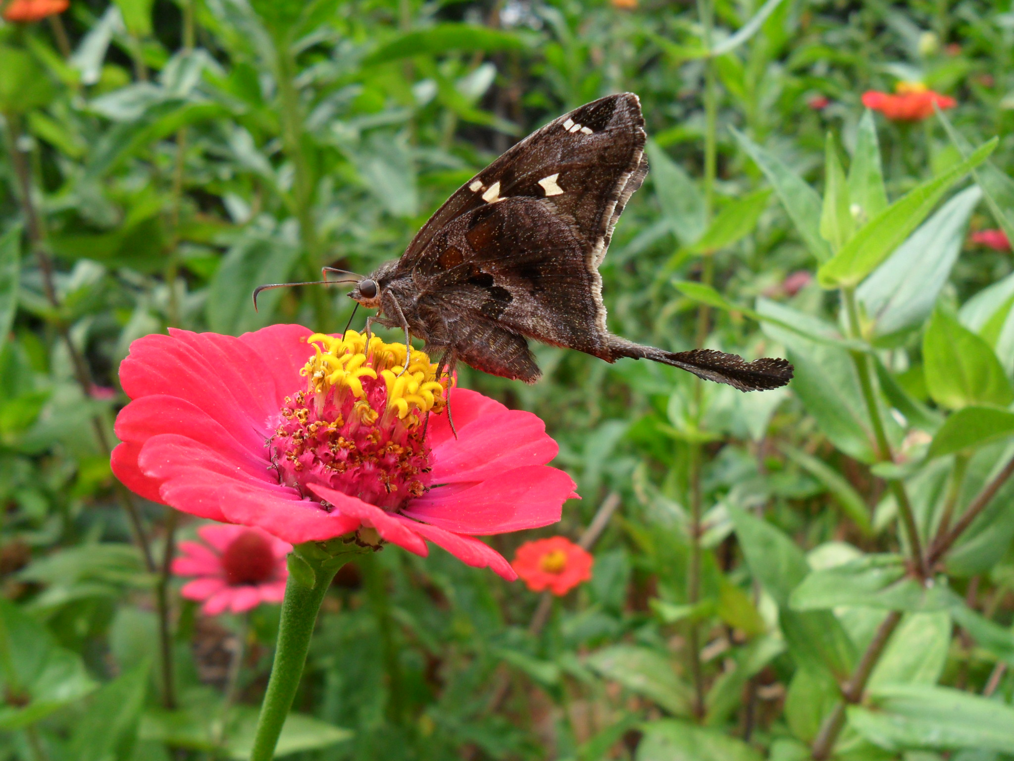 Borboleta comumente encontrada em centros urbanos. Sua ovoposição ocorre em leguminosas como o feijão e a soja e, por tal motivo, é considerada uma praga agrícola. Suas lagartas são conhecidas popularmente como lagartas-cabeça-de-fósforo.